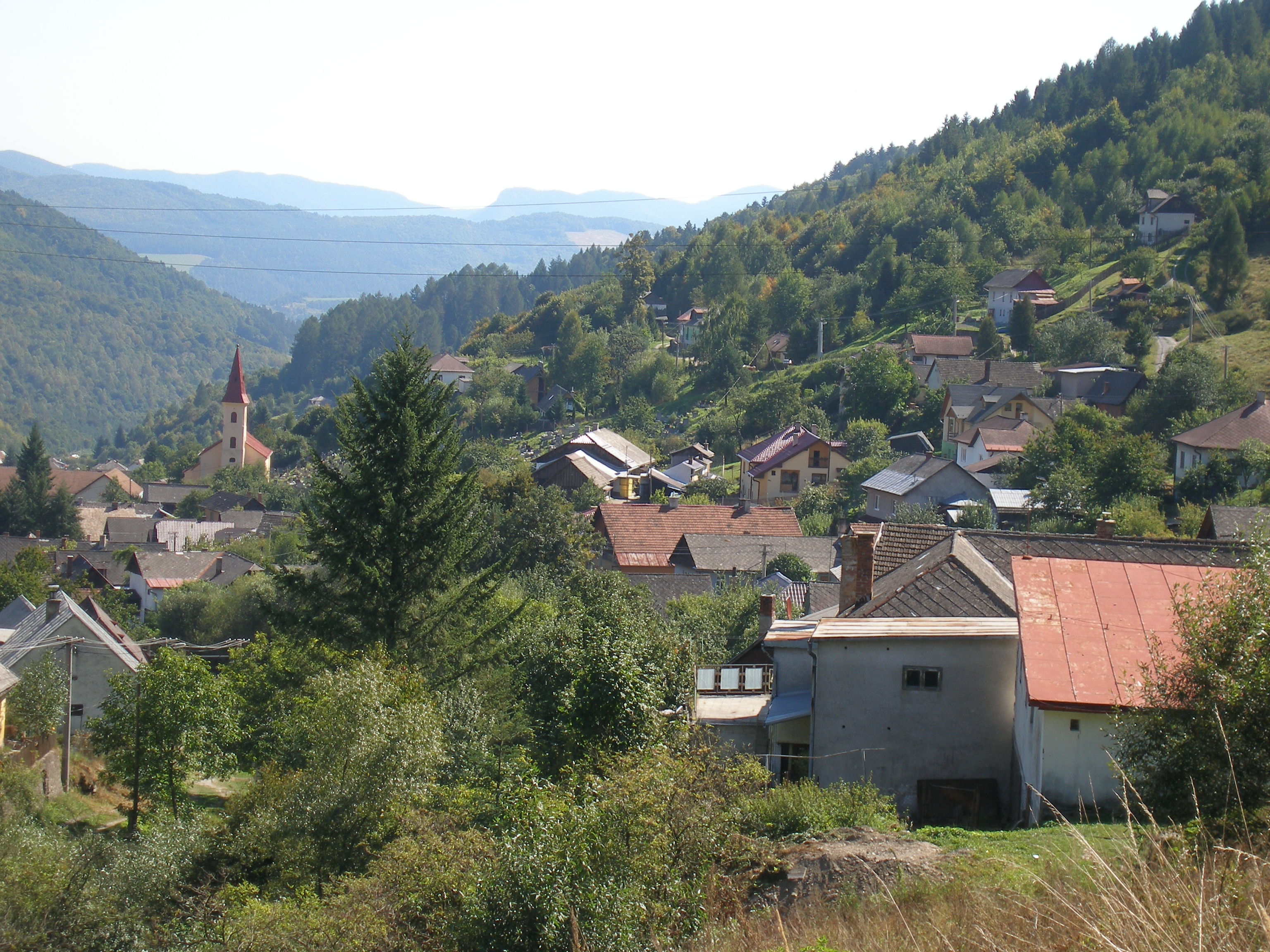 Spišská obec Žakarovce.Okres Gelnica.